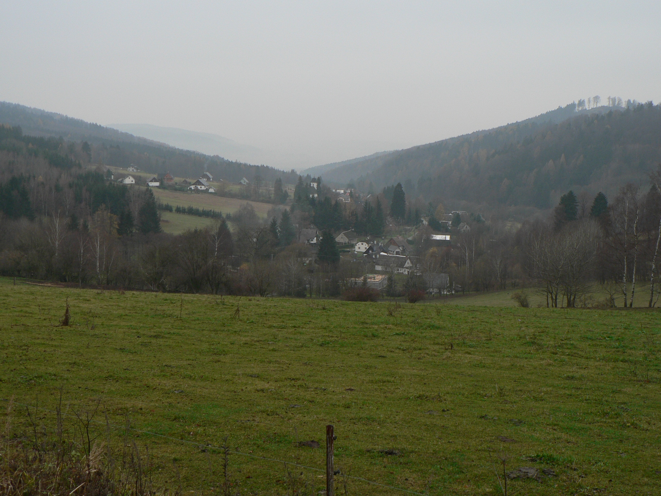 Pohled na Hraběšice od Traťovky